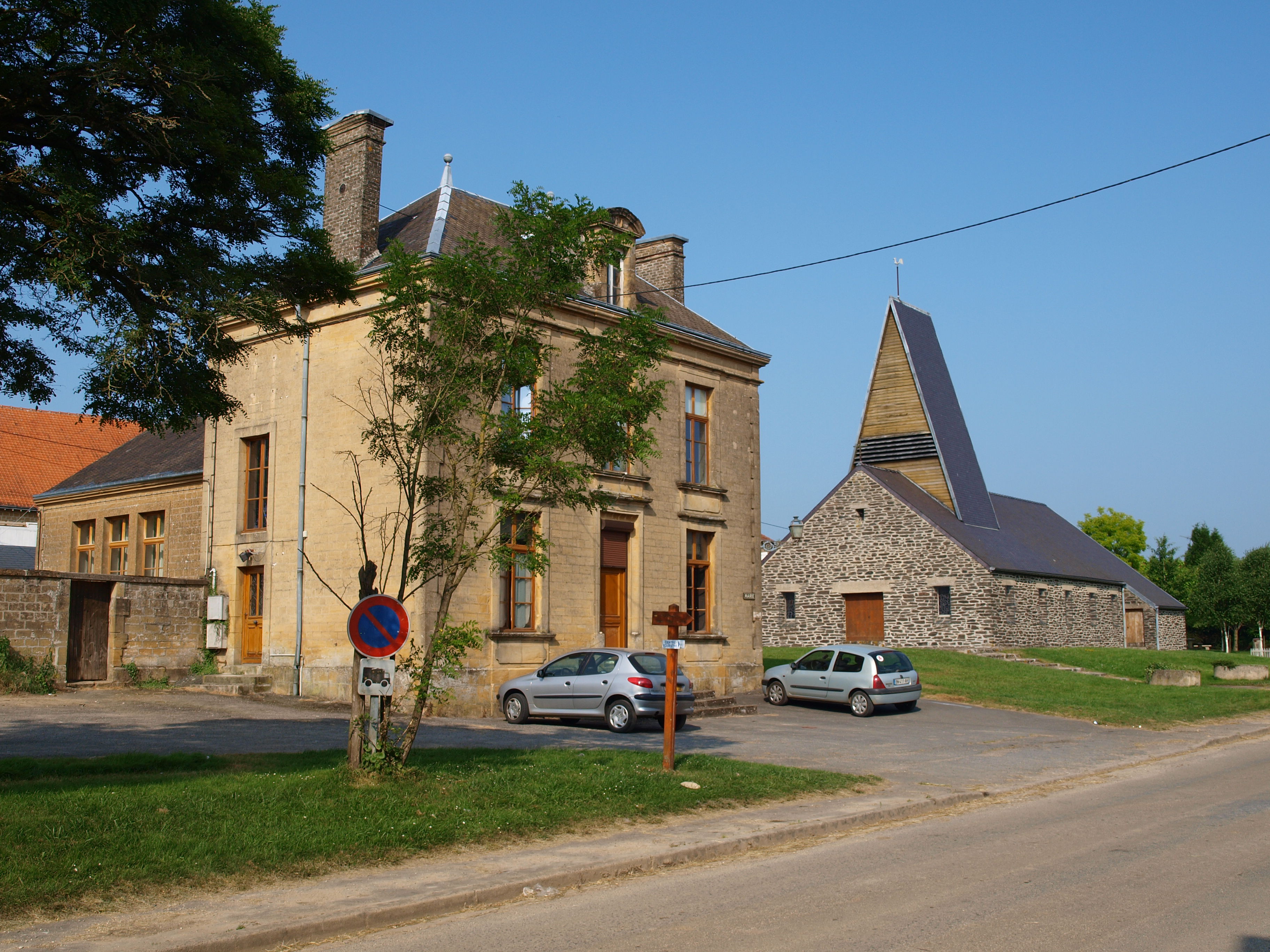 La Neuville-à-Maire (Ardennes, France) , mairie & église